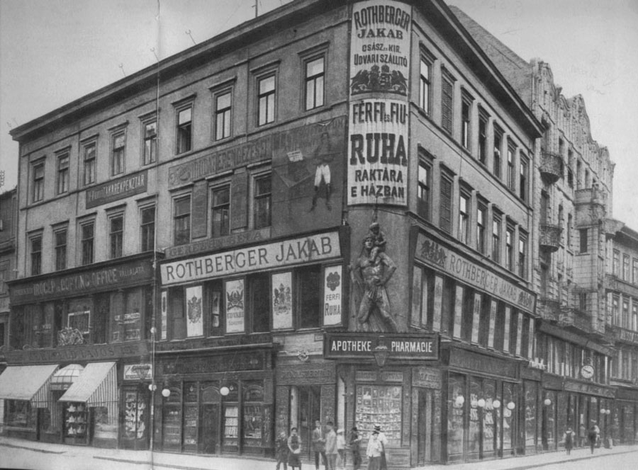 Budapest- Kristóf tér és Váci utca sarka